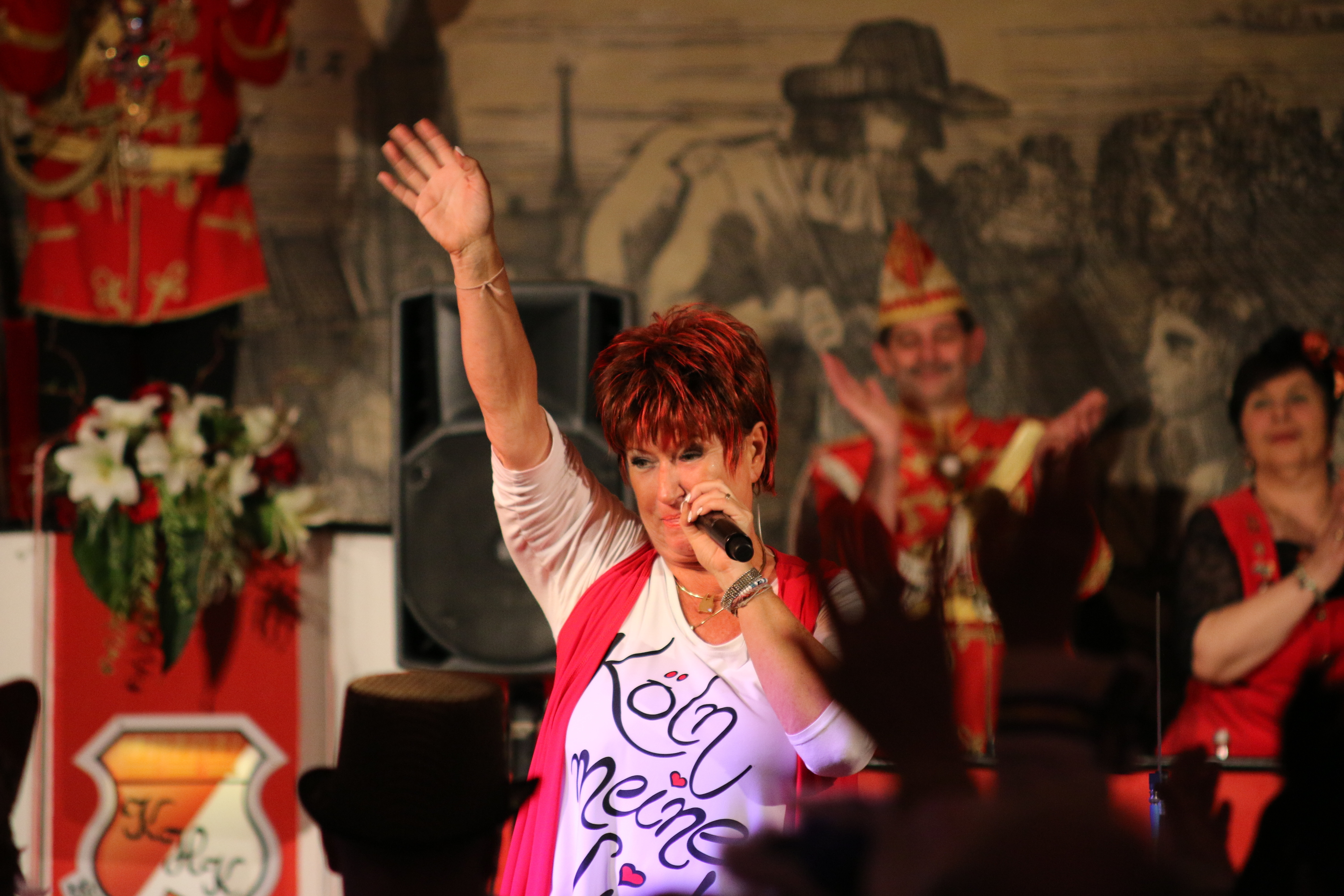 Kölner Husaren-Korps Prunksitzung 2014: Auftritt von Marita Köllner